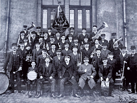 Sujet:Bouneweger Musek am Joer 1903